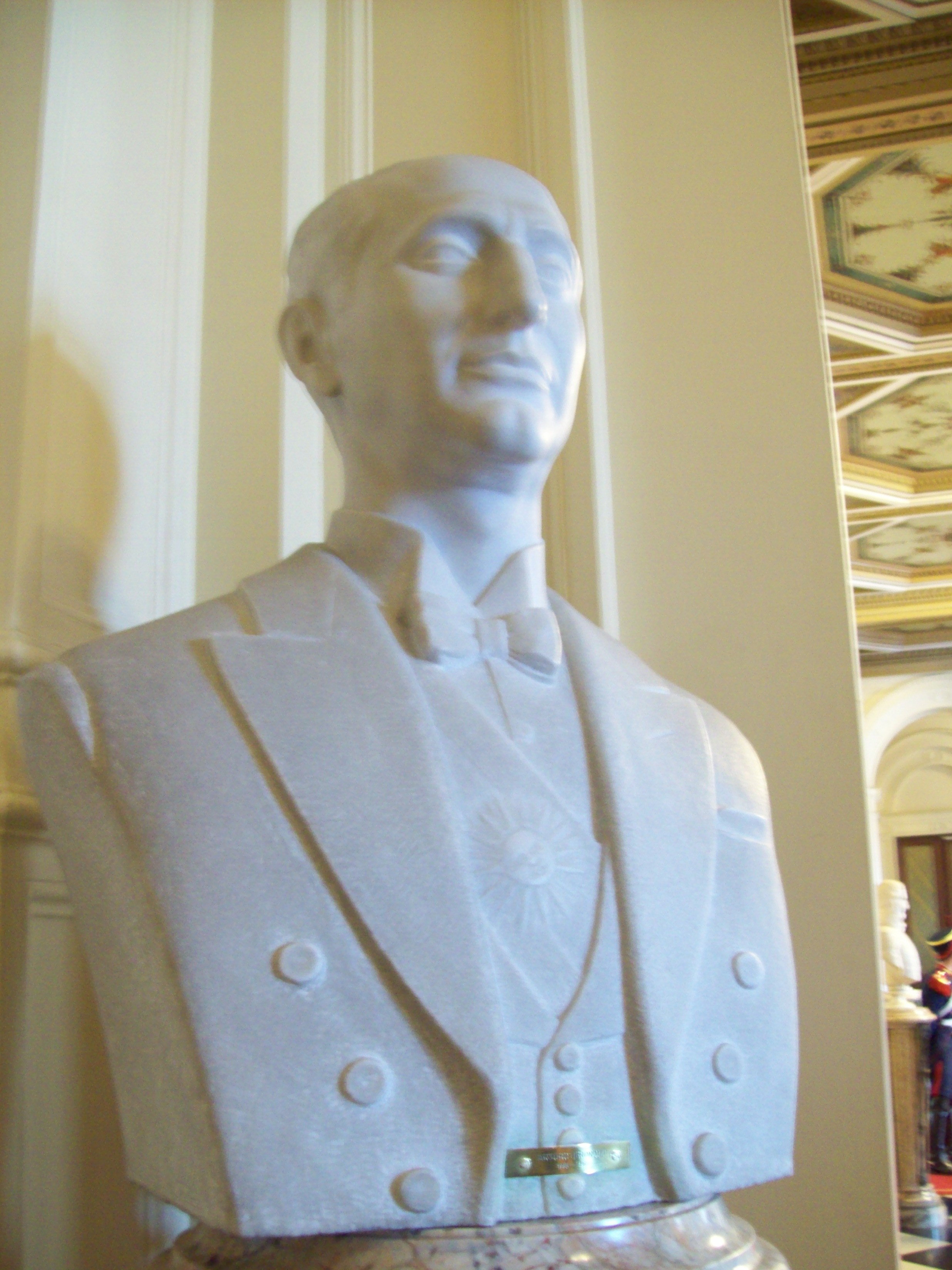 Busto del presidente Arturo Frondizi (1958-1962) en la Casa Rosada.